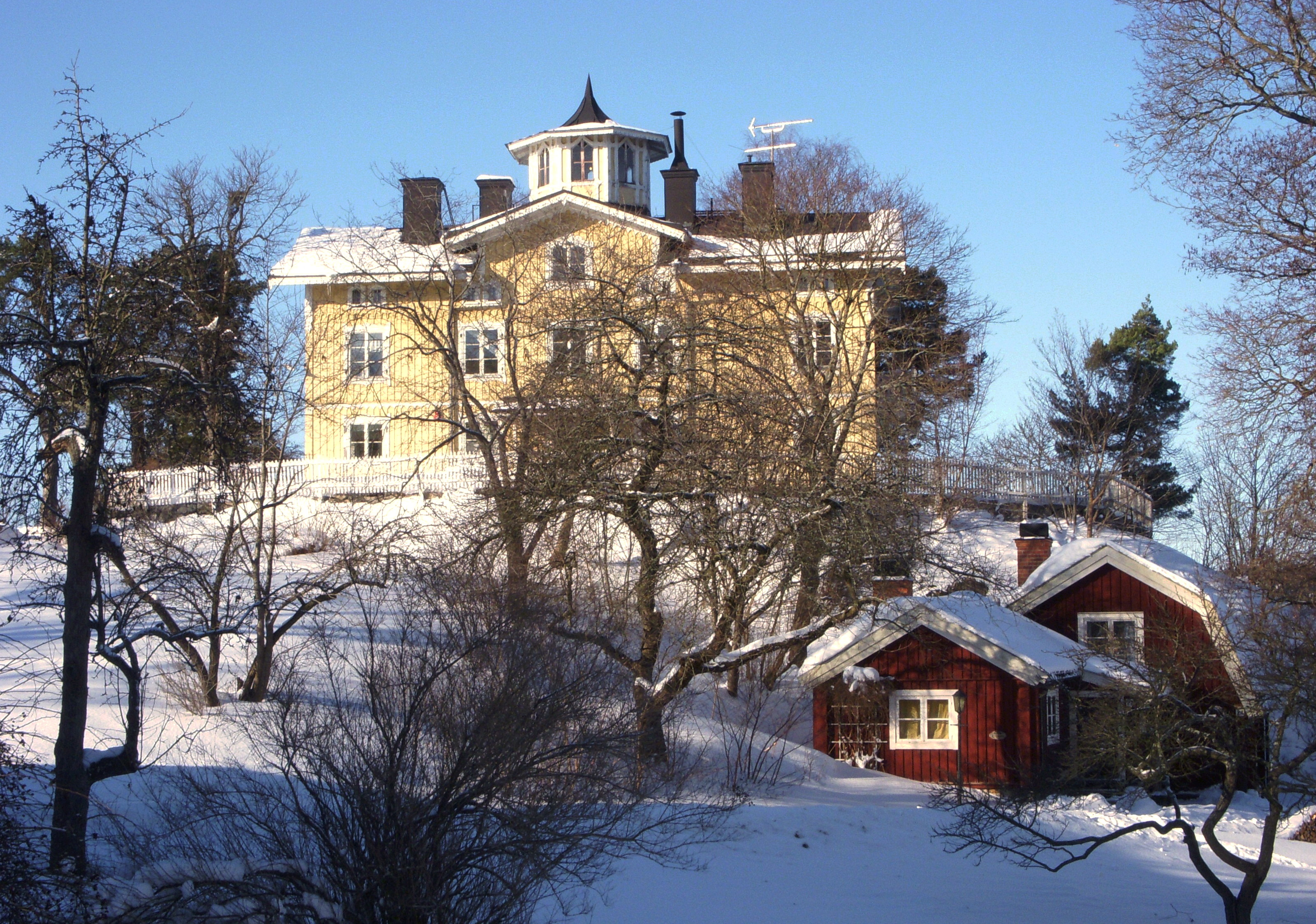 Tornvillan, Klubbensborg, Mälarhöjden, längst ner till höger syns fader Höks krog